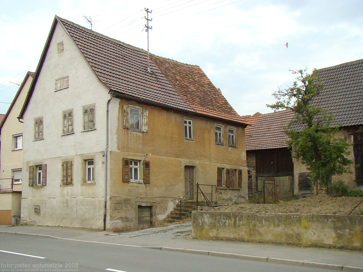 Denkmalgeschütztes Gehöft Schlossstr. 92 in Heilbronn-Kirchhausen